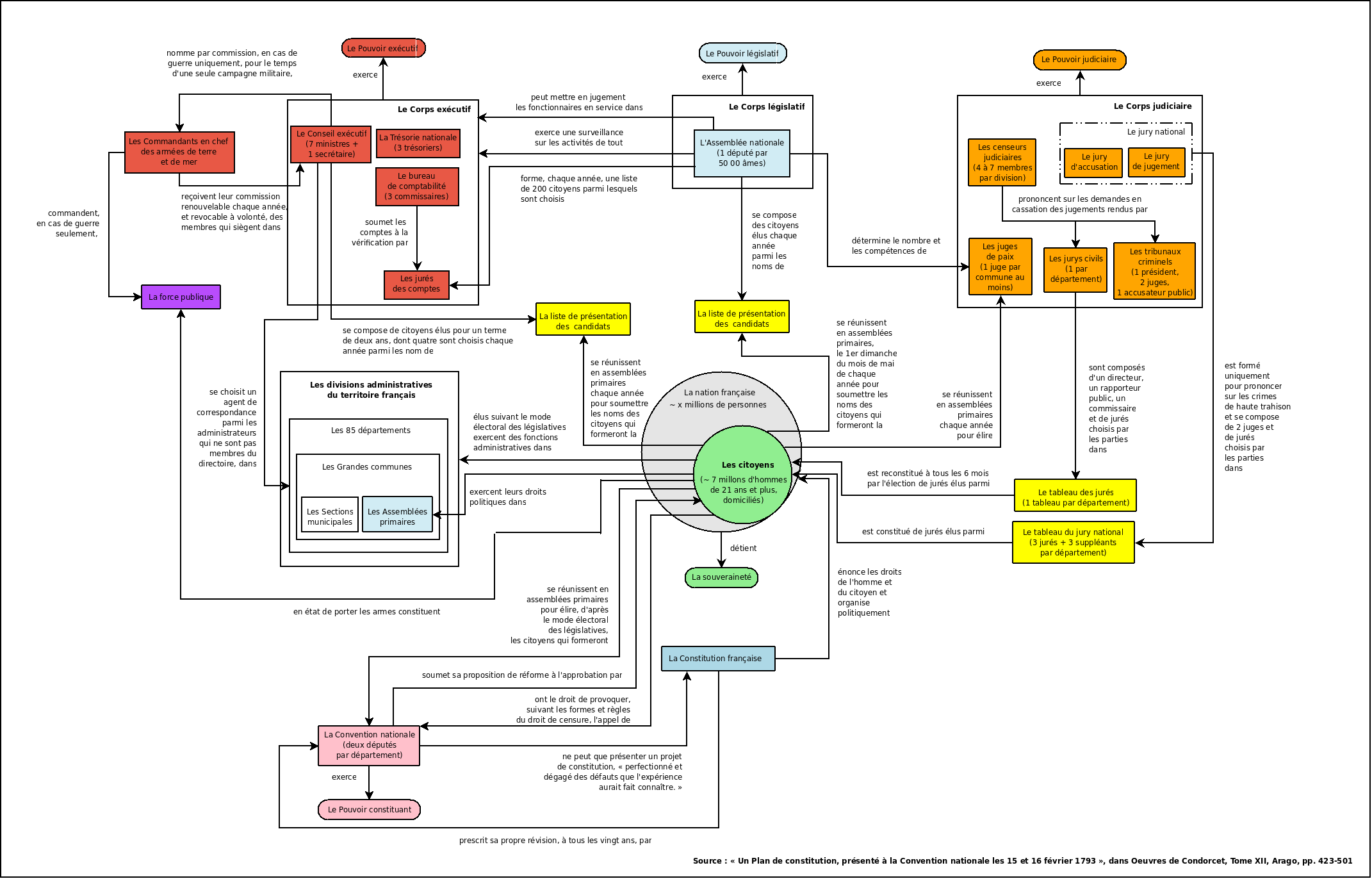 Diagramme de la constitution de Condorcet